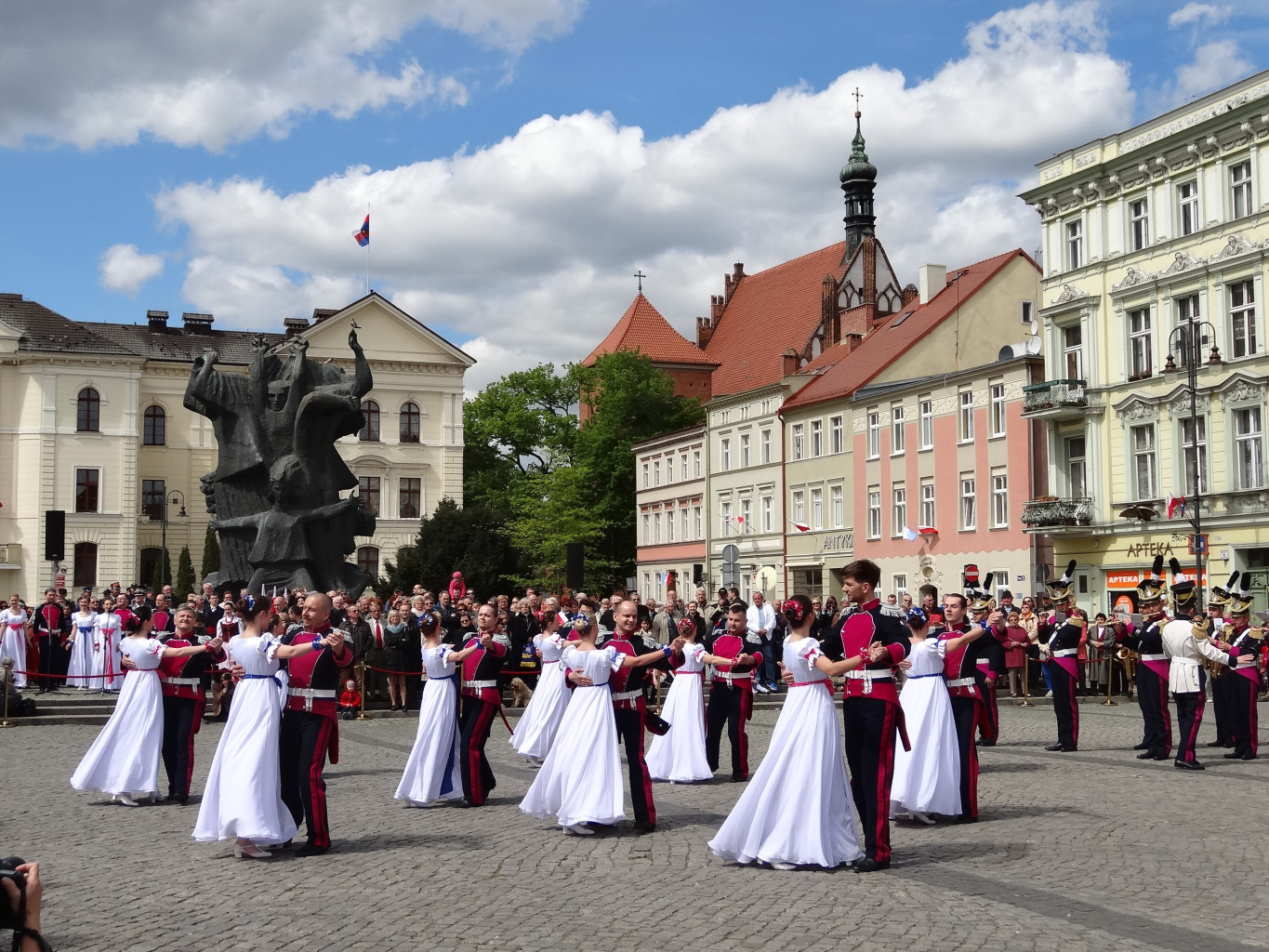 Święto Konstytucji 3 Maja 2014 roku na Starym Rynku w Bydgoszczy z udziałem orkiestry wojskowej garnizonu bydgoskiego oraz Zespołu Pieśni i Tańca Ziemia Bydgoska